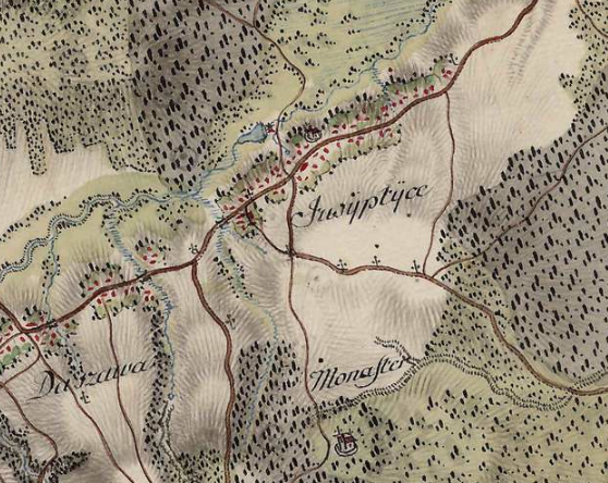 18 ст.